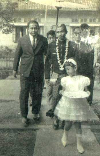 RT Male Wiranatakusumah mengantar nikah keponakan Ir. Moch Memed bersama RE Abdullah (Bupati Bogor).